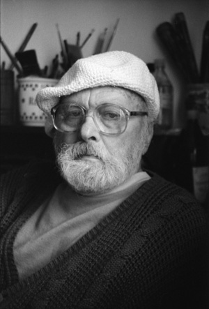 Szabó Vladimir a műtermében (Budapest, 1987)